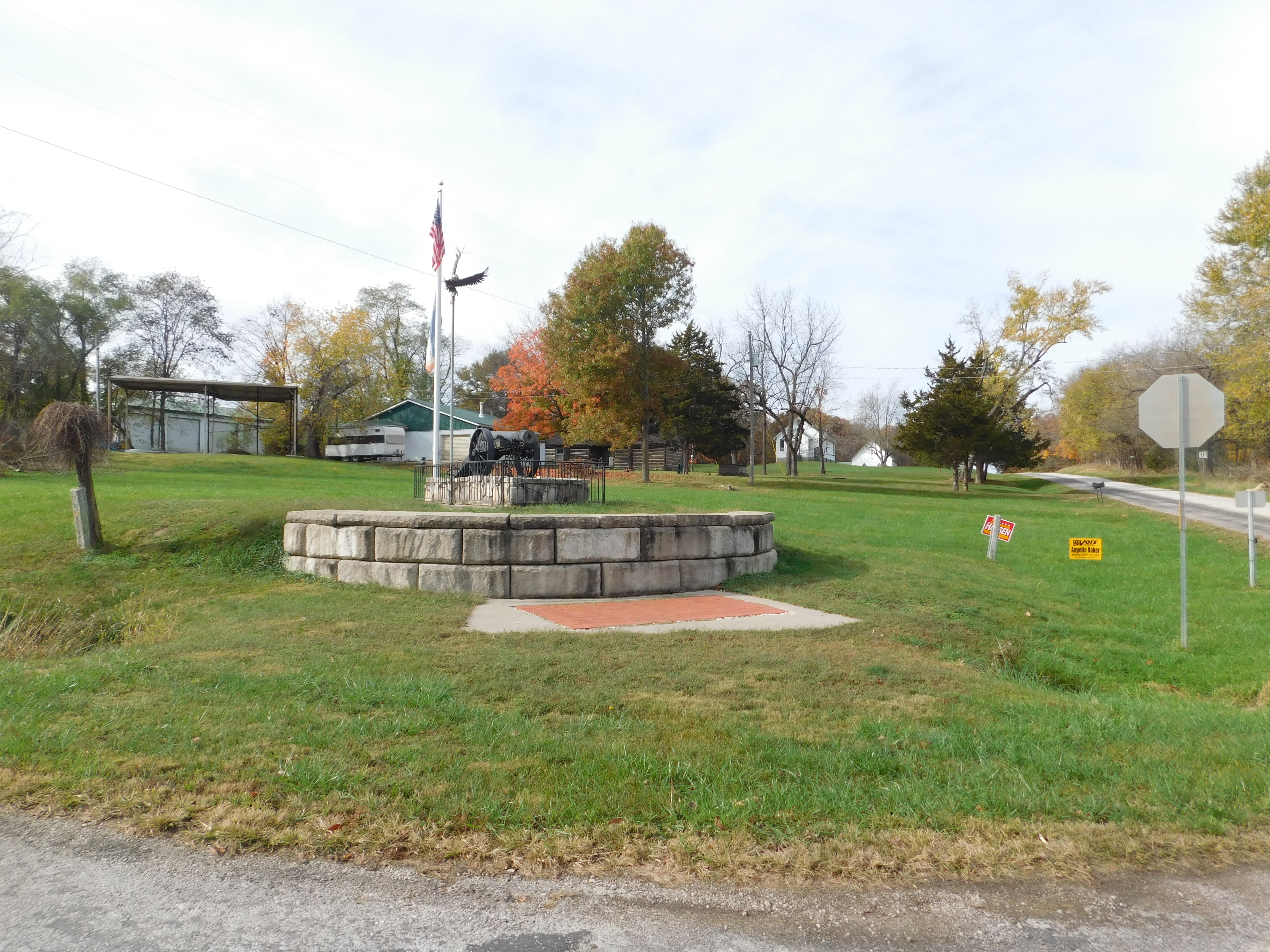 Florida, Missouri.